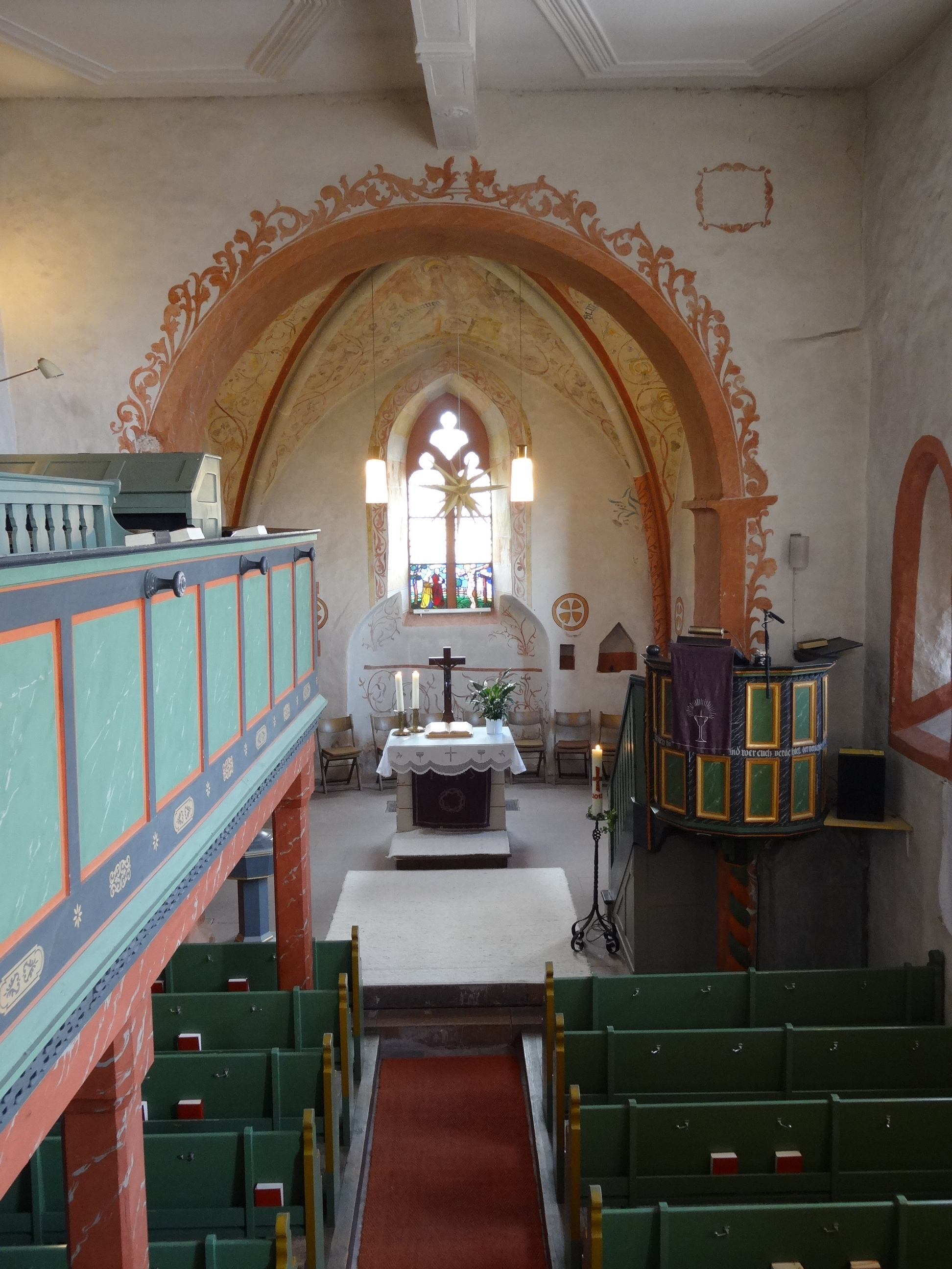 Evangelische Pfarrkirche Ober-Widdersheim